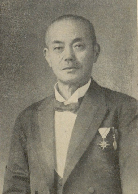 藤原光蔵。藤原咲平の父。新田次郎の祖父。